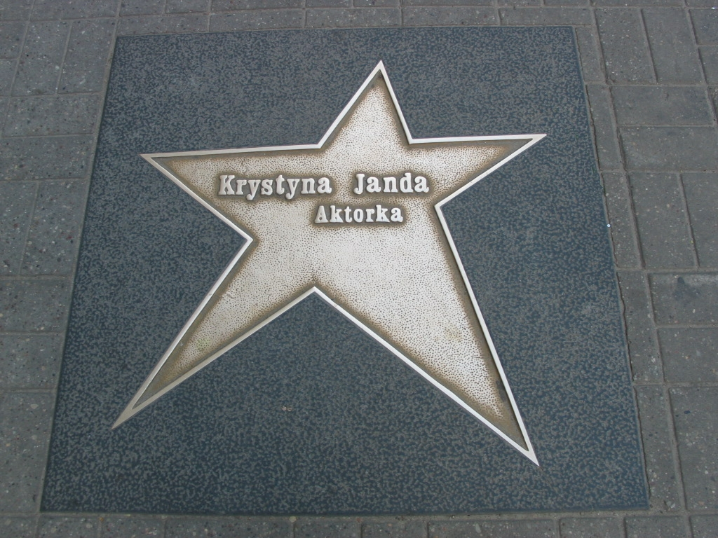 Łódź Walk of Fame - Krystyna Janda